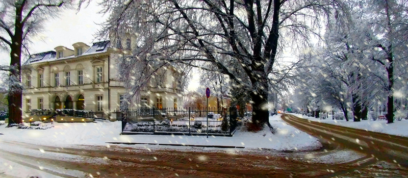 Świdnica, Tołstoja 2,Świdnica, ul. Lwa Tołstoja 2